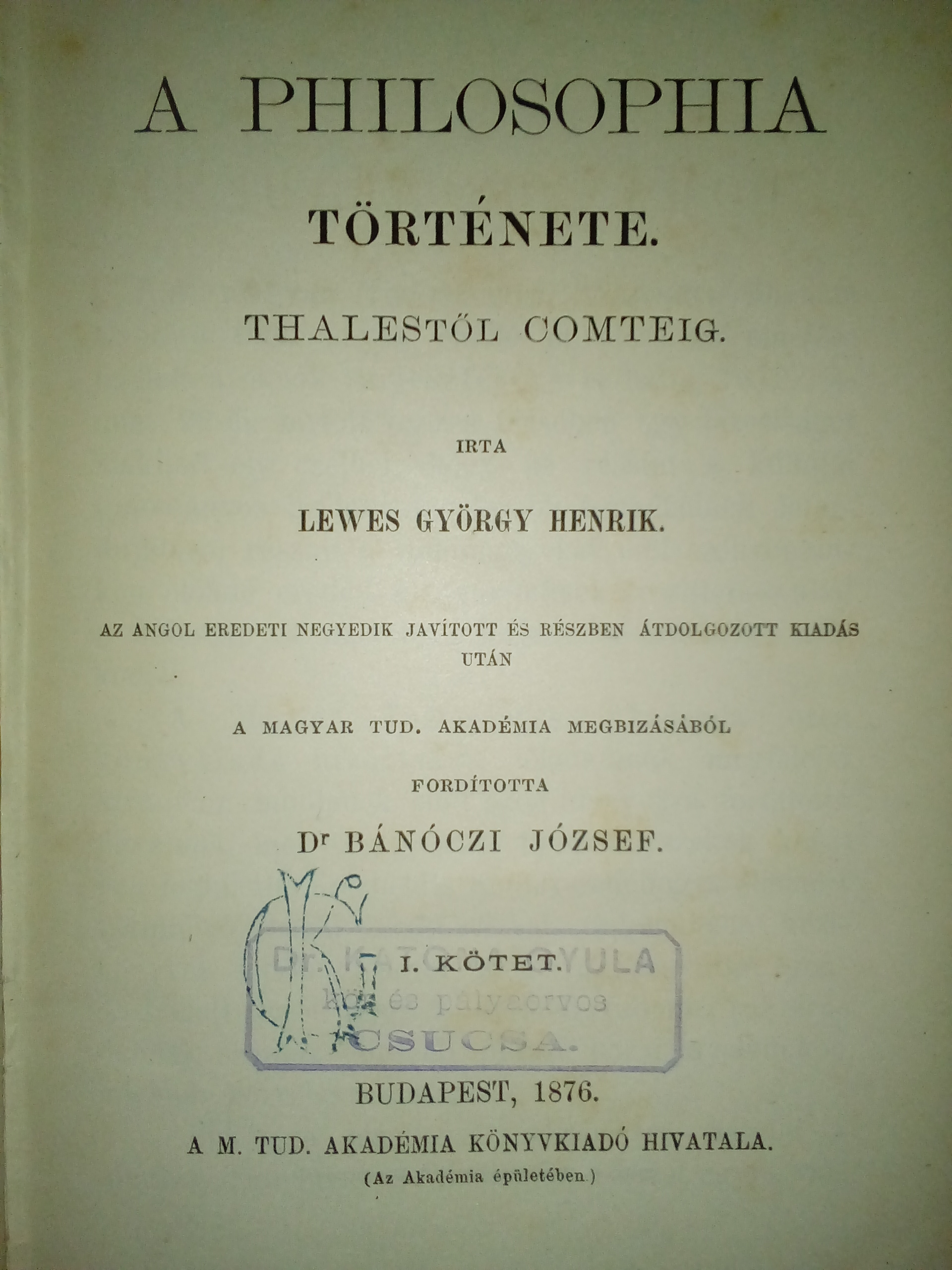 Az adott mű címlapja.